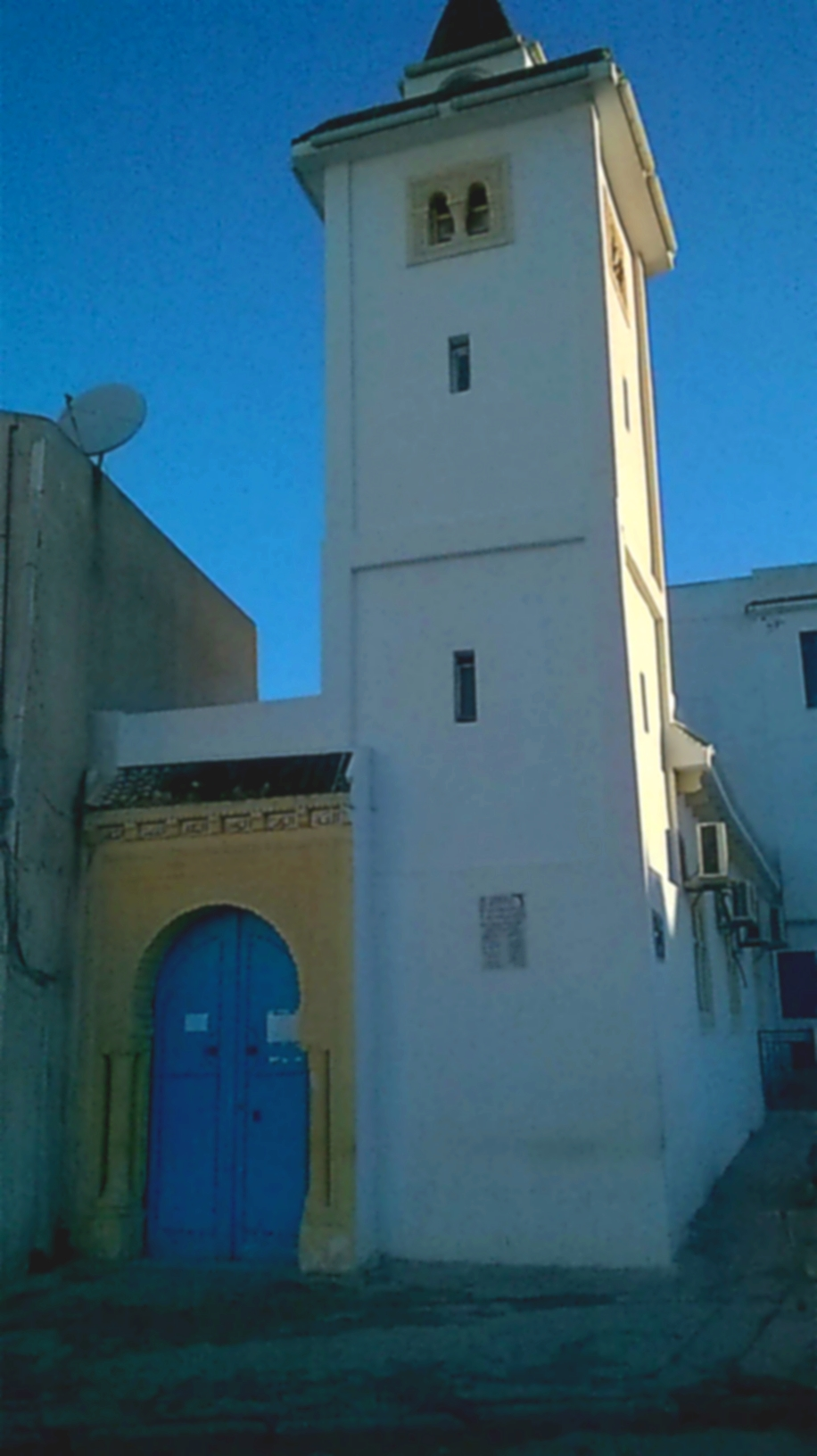 Bab El Khadra, Bab Souika , Tunis باب الخضراء , باب سويقة ، تونس